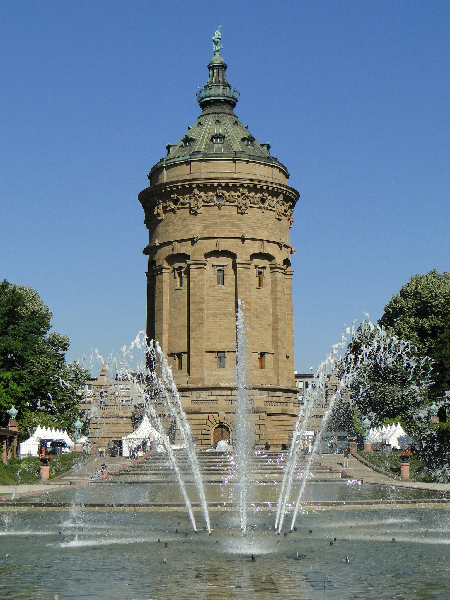 Mannheim